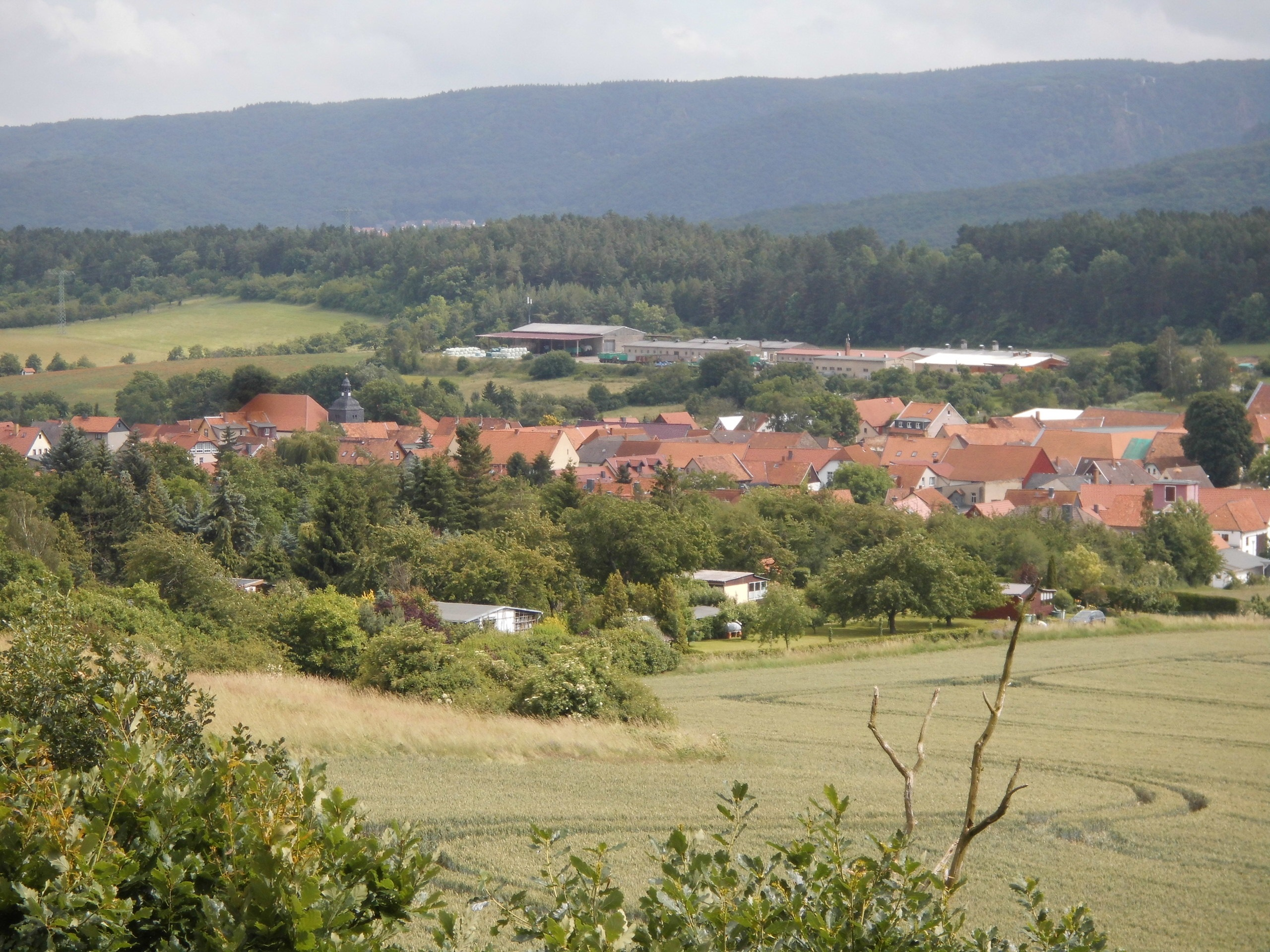 Zicht op Timmenrode - Blankenburg (Harz) - Saksen-Anhalt - Duitsland